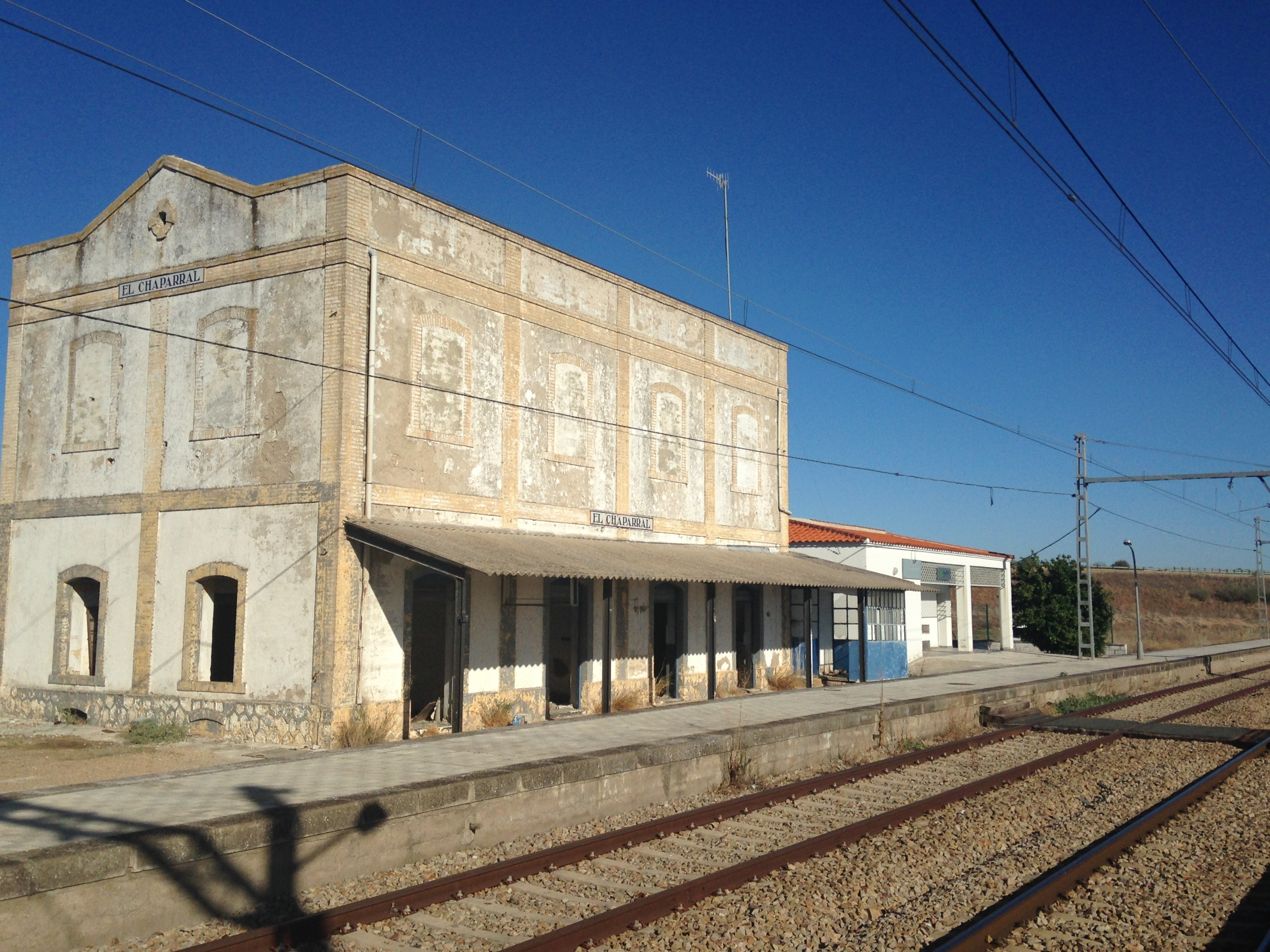 Estación de El Chaparral junto a la A-45 en su confluencia con la línea férrea Córdoba-Málaga